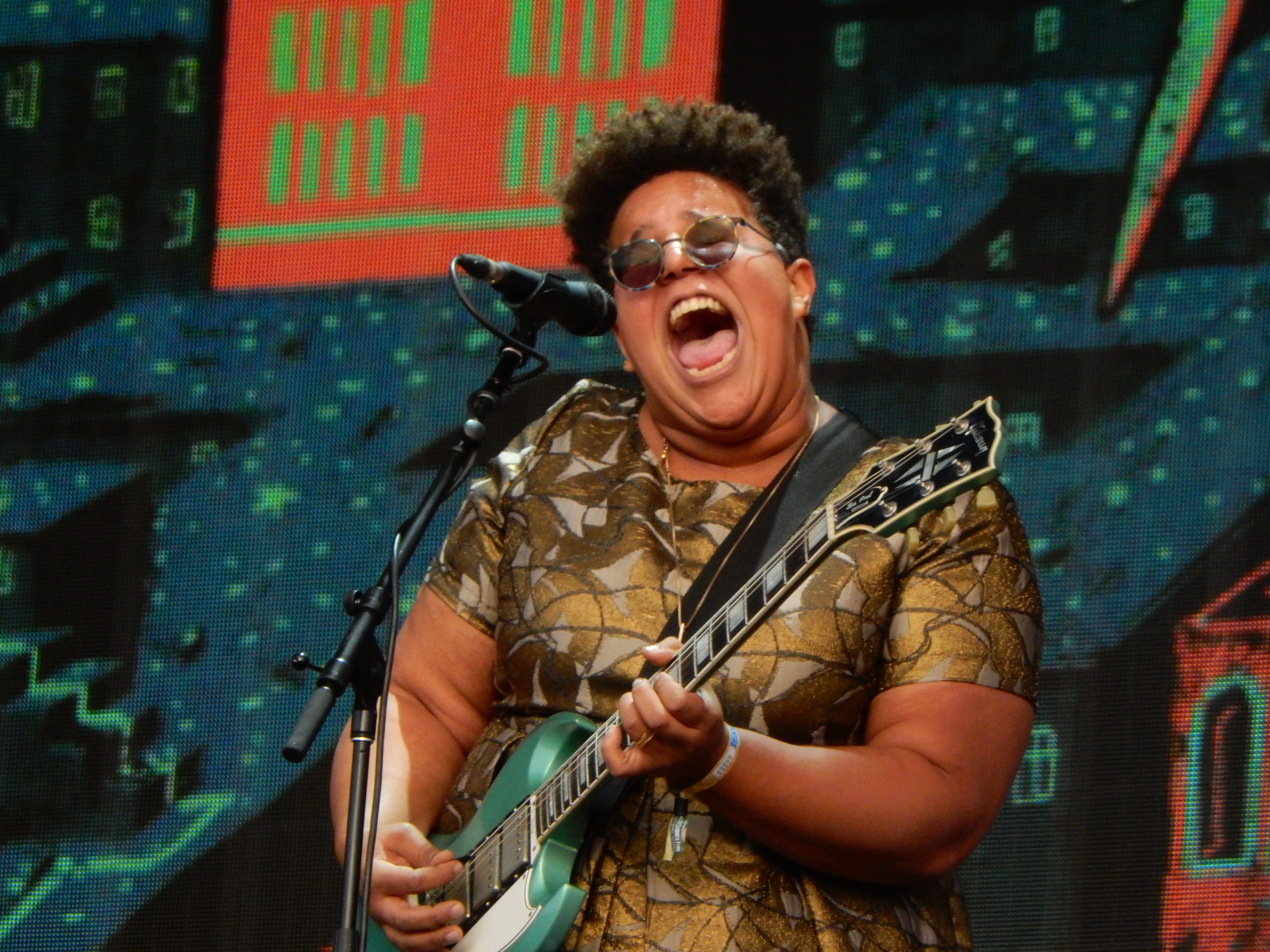 Alabama Shakes, BST Hyde Park, London